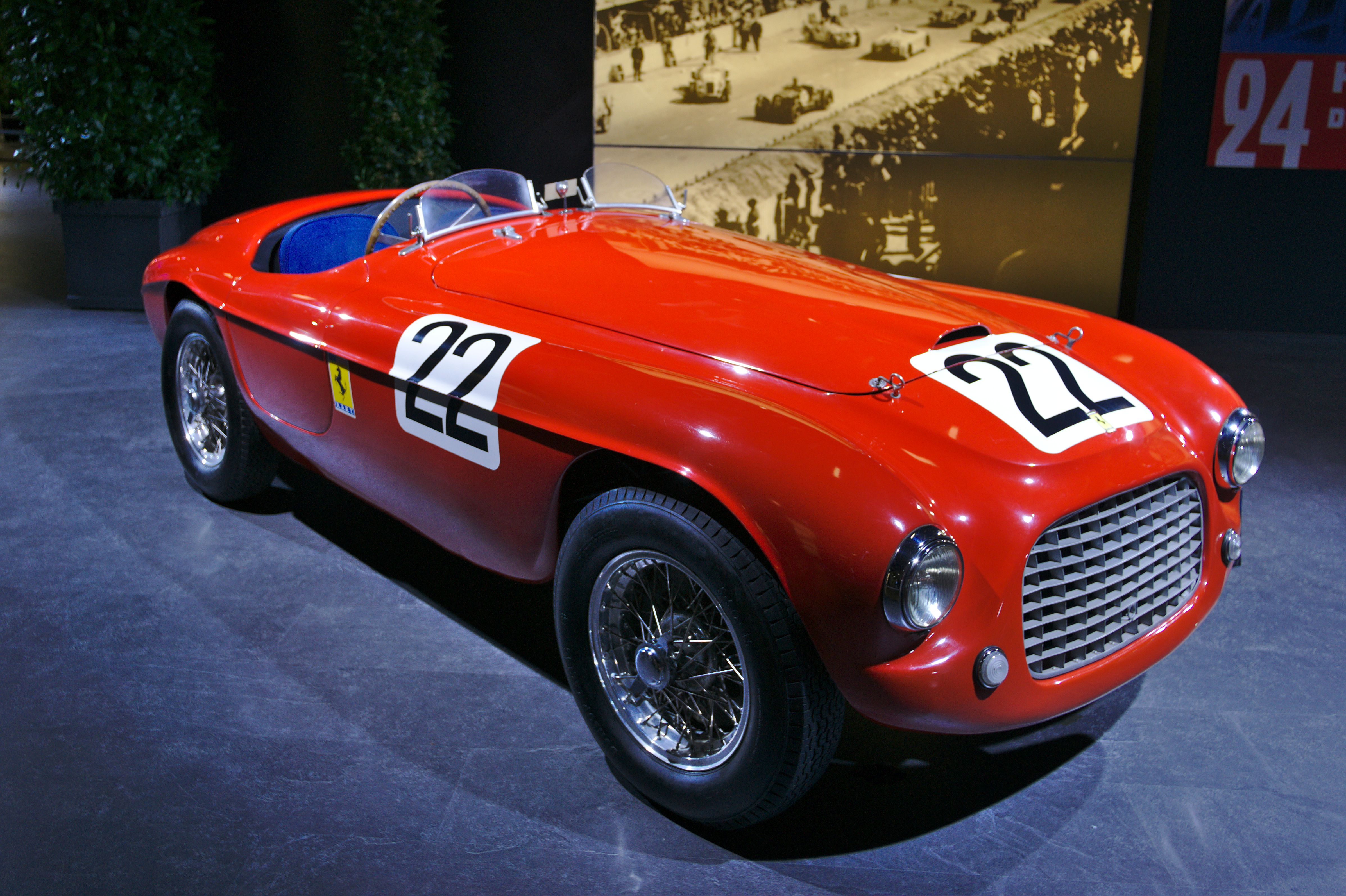 Salon de l'auto de Genève 2014 - 20140305 - Expo Le Mans